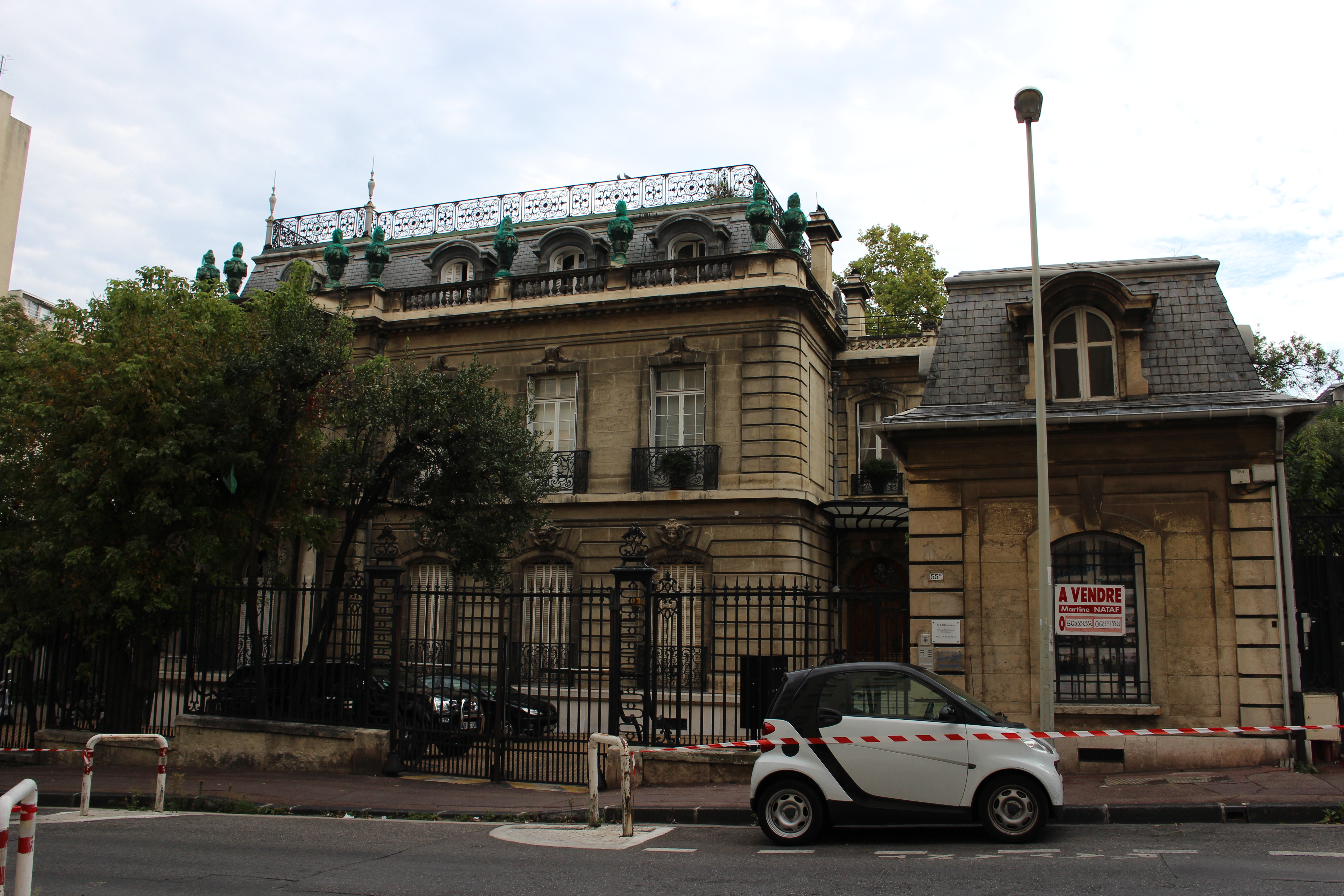 Immeuble